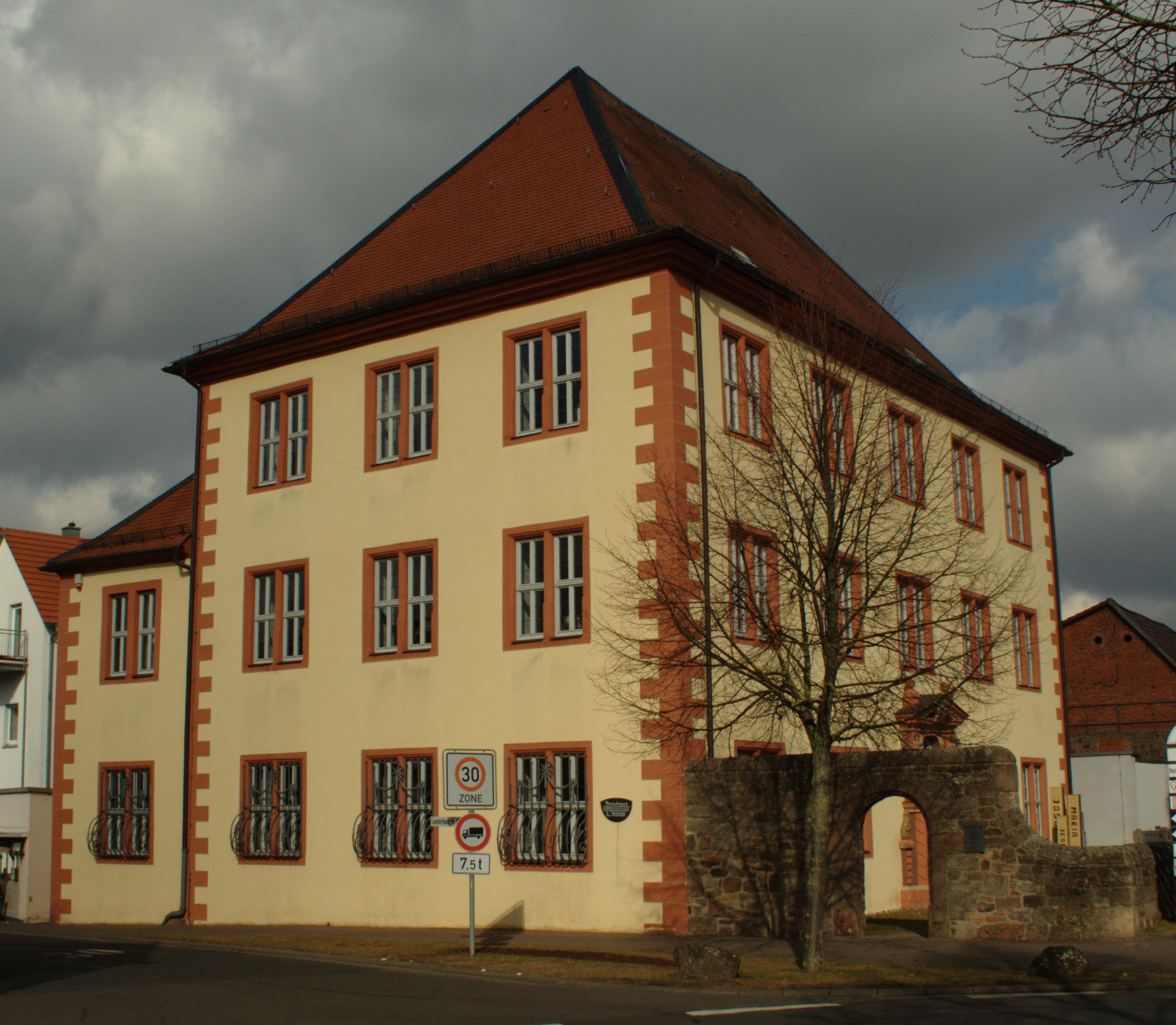 Grossenlueder Hessen Stiftskapitularisches Amtshaus Großenlüder